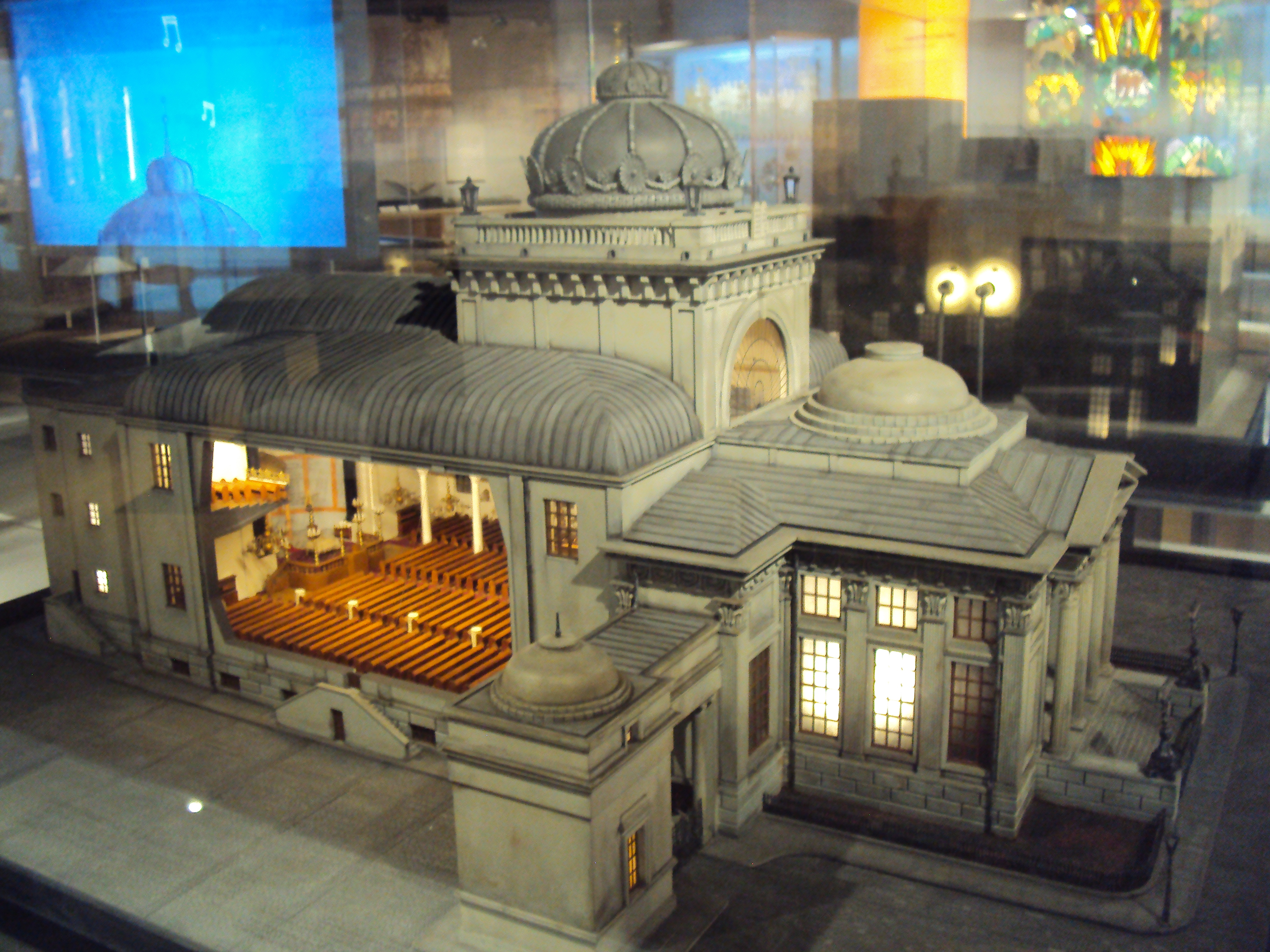 דגם בית הכנסת הגדול (טלומצקה) בוורשה, בהיכל בתי הכנסת באגף החדש של בית התפוצות